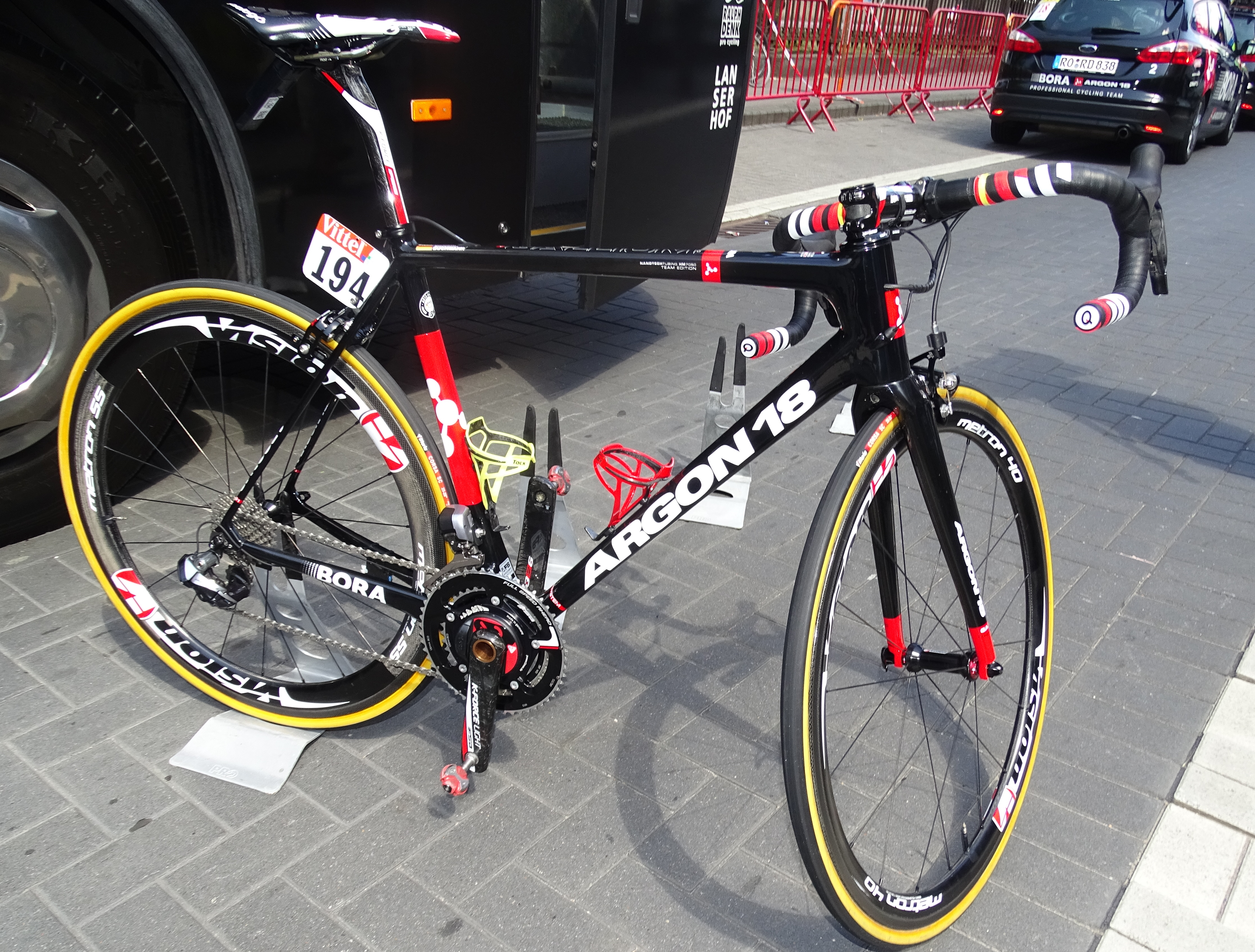 Reportage réalisé le lundi 6 juillet à l'occasion du départ de la troisième étape du Tour de France 2015 à Anvers, Belgique.